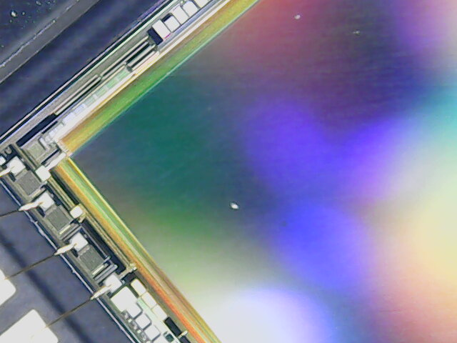 Фотография КМОП матрицы